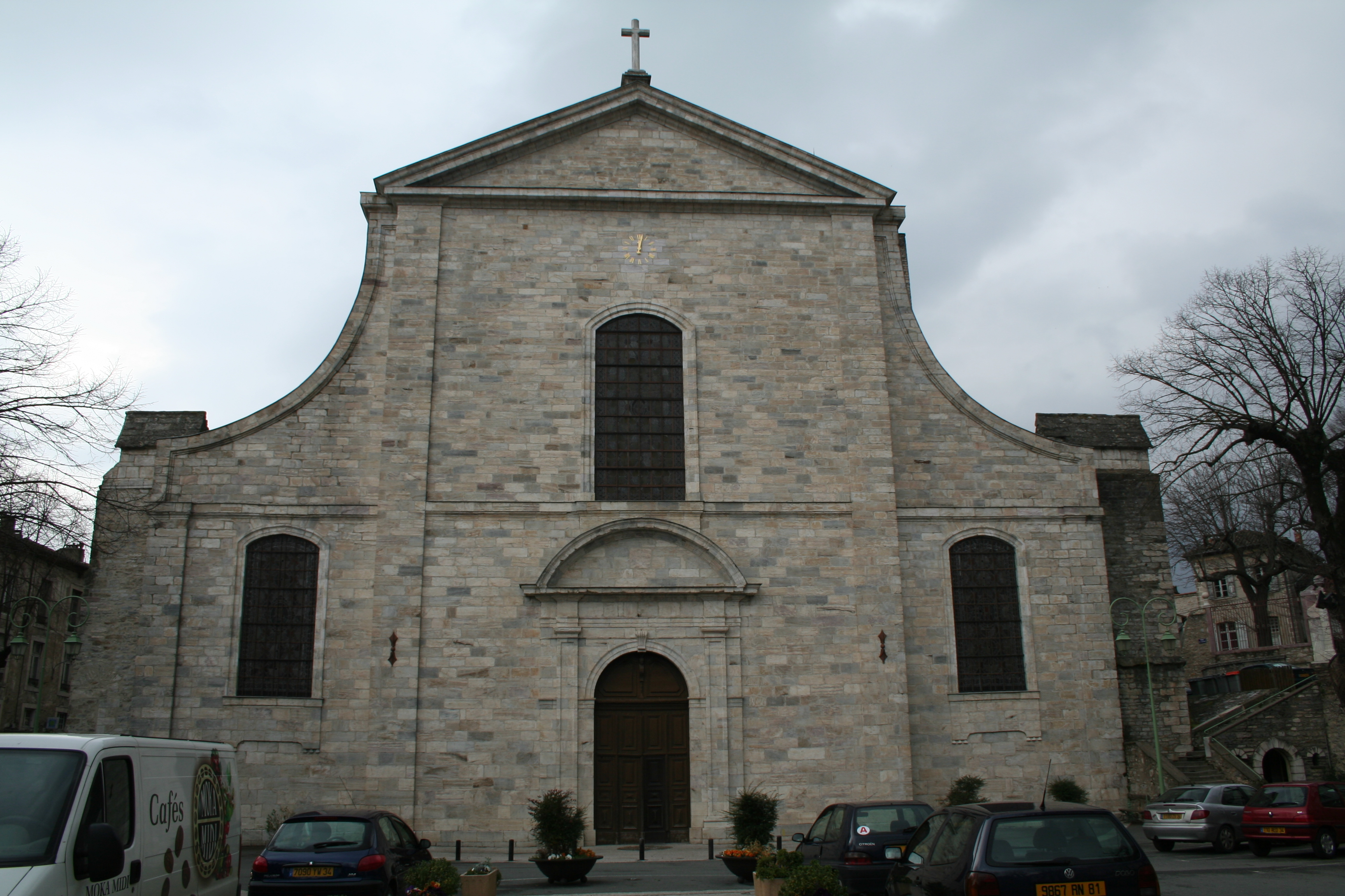 Saint-Pons-de-Thomières (Hérault)- cathédrale - façade orientale (construite à la place de l'ancien chœur, détruit pendant les guerres de Religion).